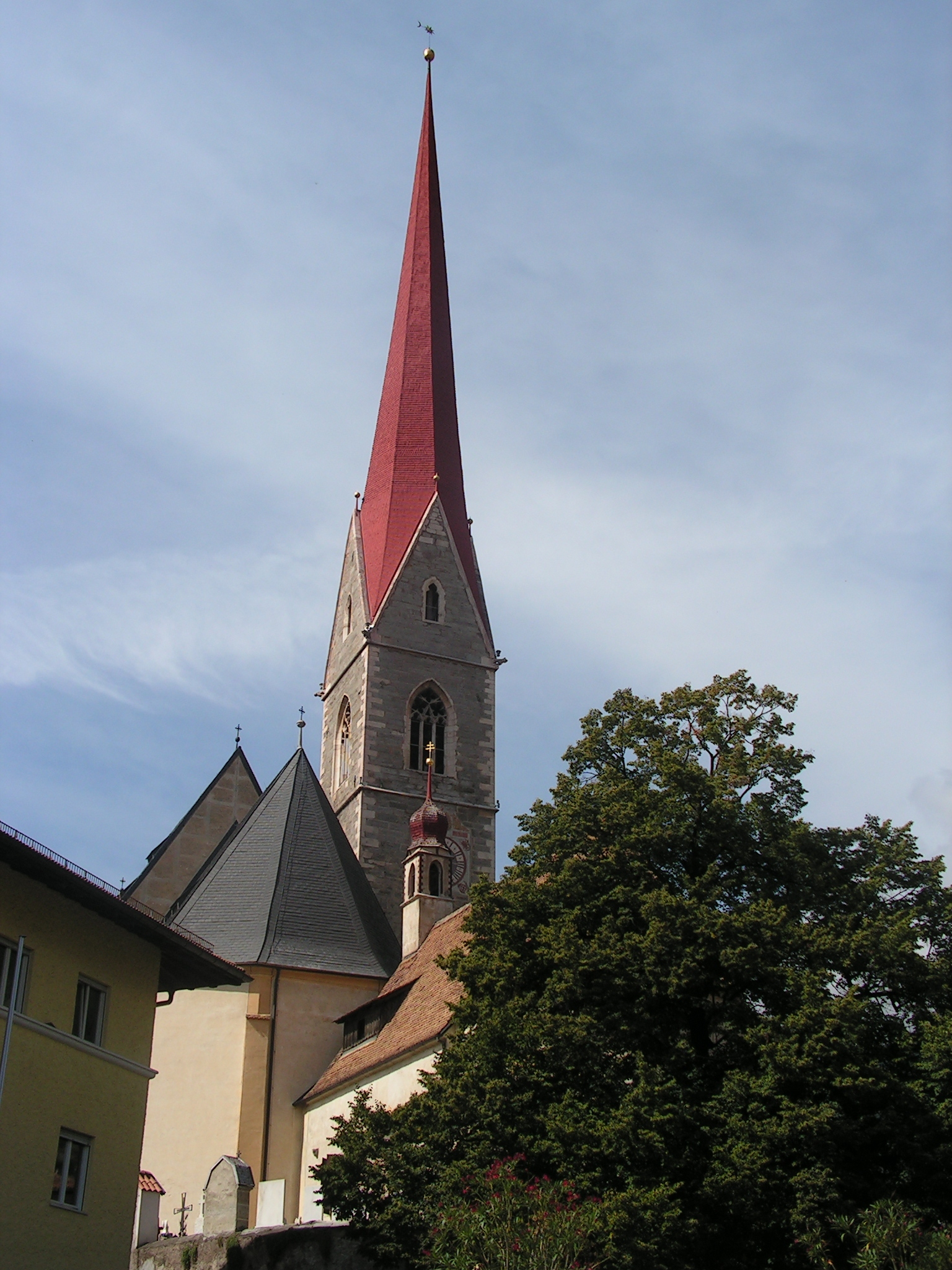 Silandro (Schlanders) Chiesa parocchiale Maria Himmelfahrt